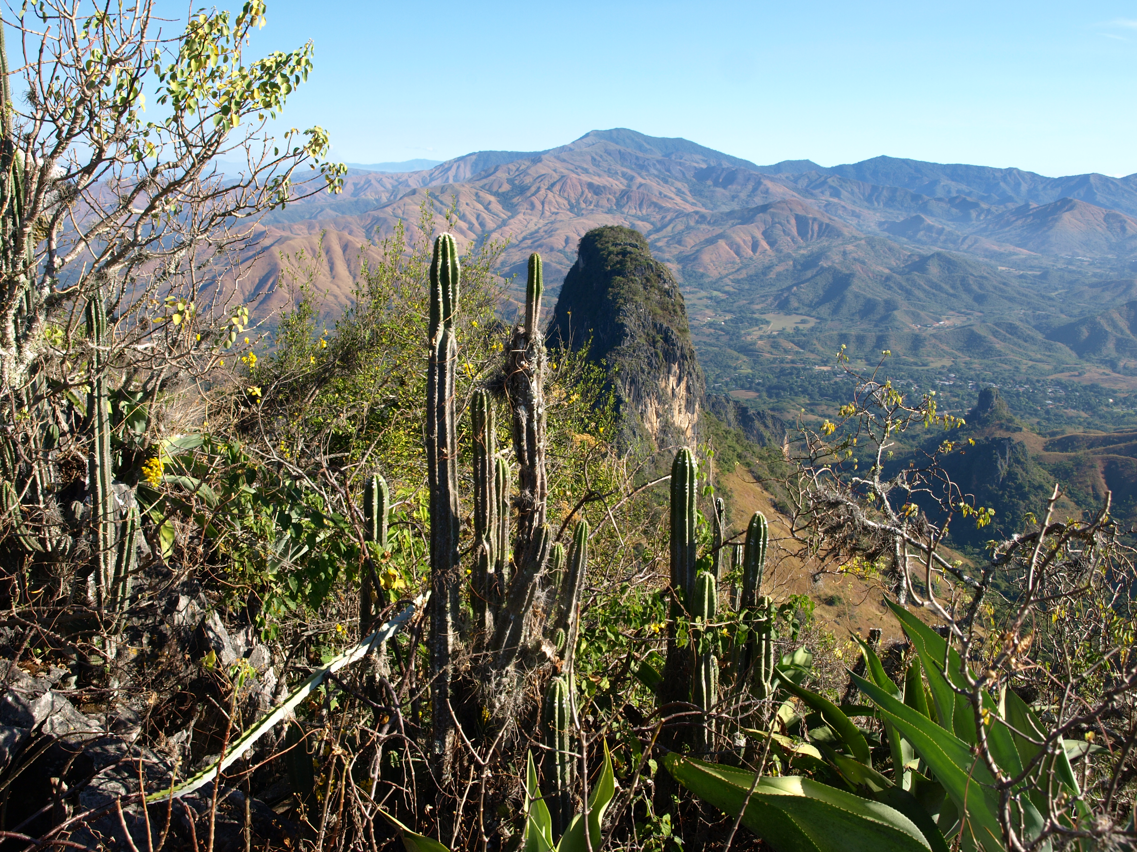 ECOSIMBIOSIS.